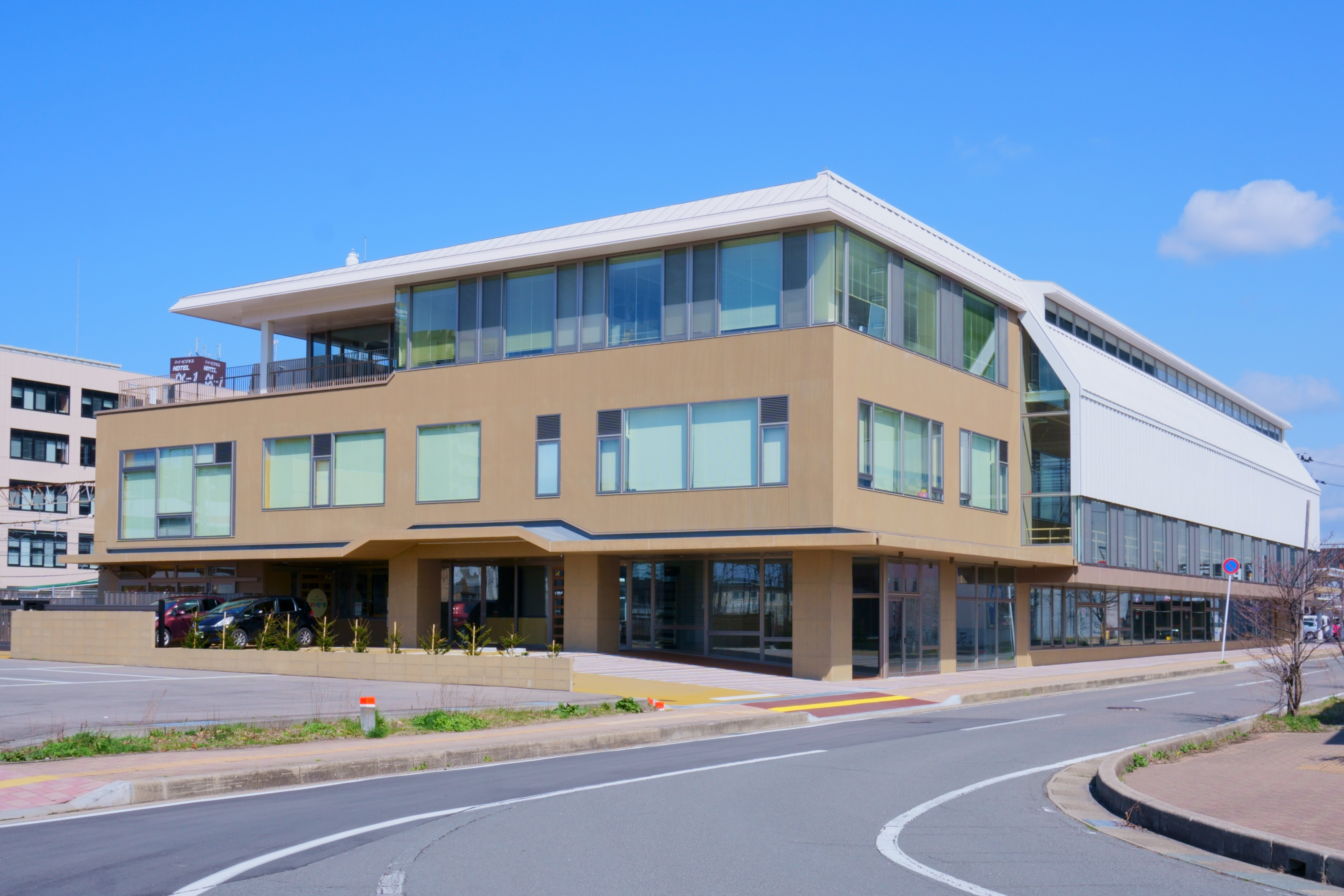 秋田ノーザンゲートスクエア。秋田駅東口にJR東日本秋田支社が開設したアリーナで、同支社の実業団バスケットボールチーム・JR東日本秋田ペッカーズの練習拠点のほか、Bリーグ・秋田ノーザンハピネッツの拠点としても使用される。